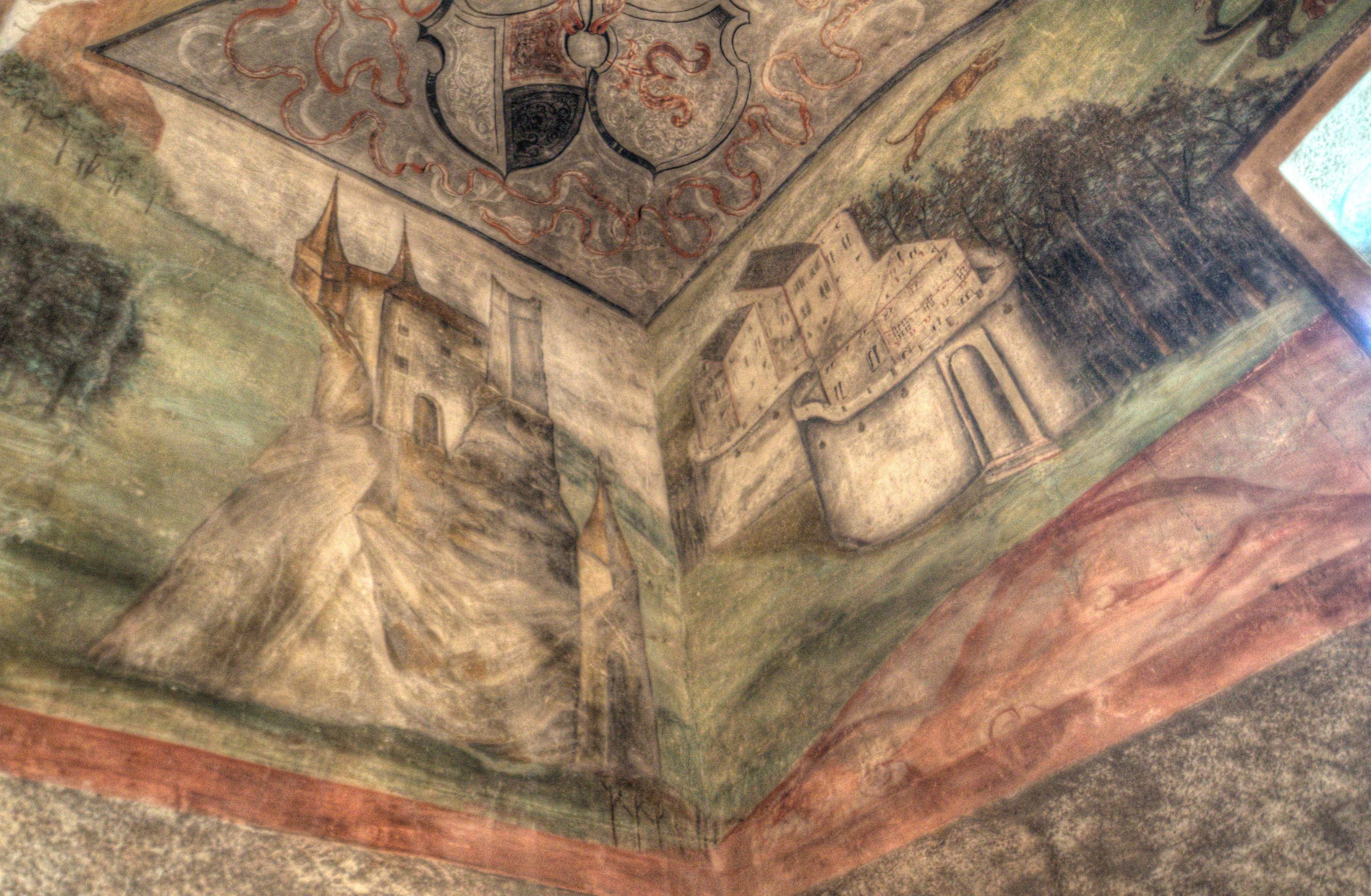 Zelená světnice - podoby hradu před a po renesanční přestavbě